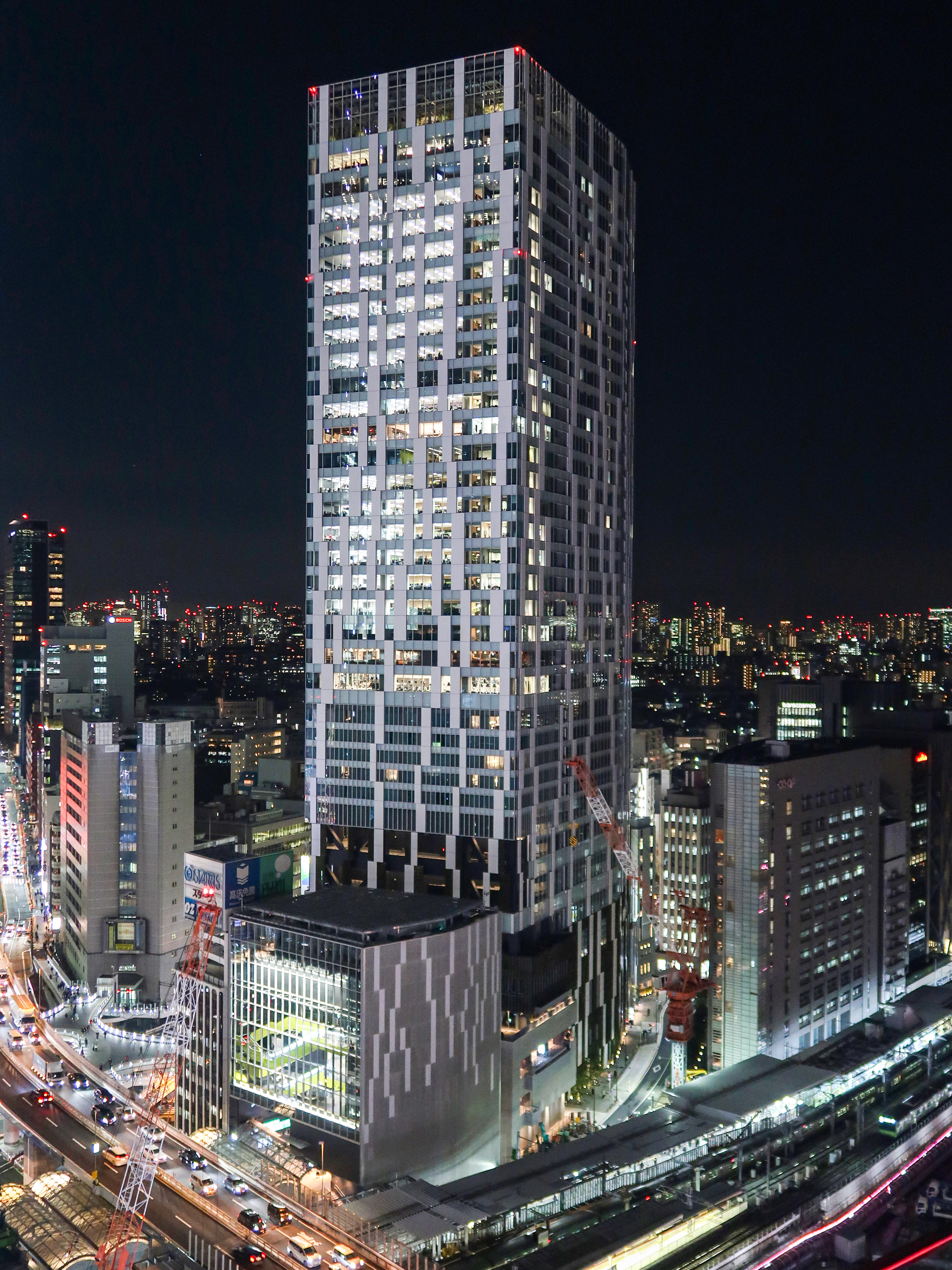 SHIBUYA STREAM